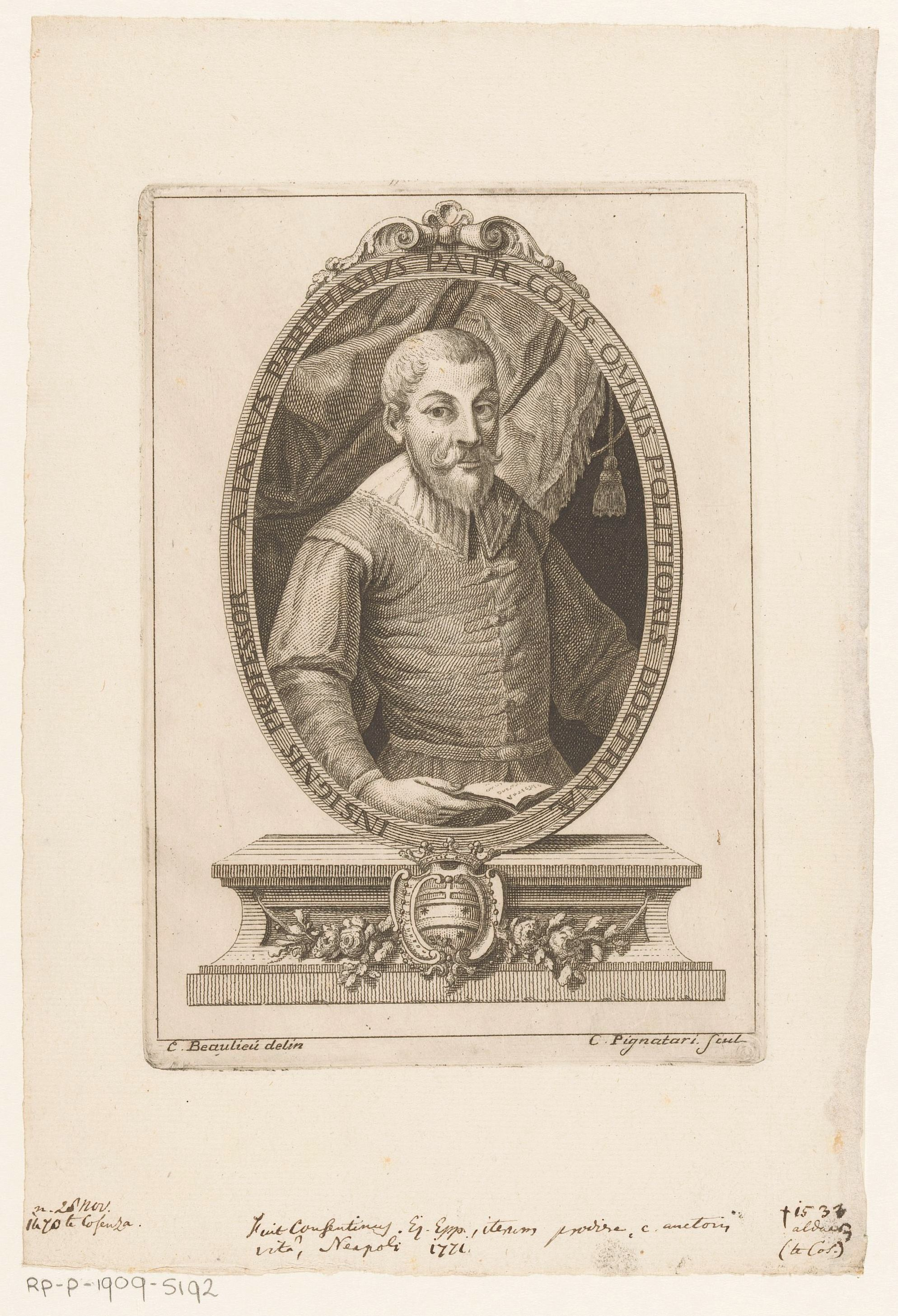 IdentificatieTitel(s): Portret van filosoof en humanist Giovan Paolo ParisioObjecttype: prent Objectnummer: RP-P-1909-5192Opschriften / Merken: verzamelaarsmerk, verso, gestempeld: Lugt 2228VervaardigingVervaardiger: prentmaker: Carmine Pignatari (vermeld op object)naar tekening van: E. Beaulieu (vermeld op object)Plaats vervaardiging: ItaliëDatering: 1700 - 1799Fysieke kenmerken: ets en gravureMateriaal: papier Techniek: graveren (drukprocedé) / etsenAfmetingen: plaatrand: h 156 mm × b 110 mmOnderwerpWat: historical personsscholar, philosopherWie: Giovan Paolo ParisioVerwerving en rechtenVerwerving: aankoop 1905Copyright: Publiek domein